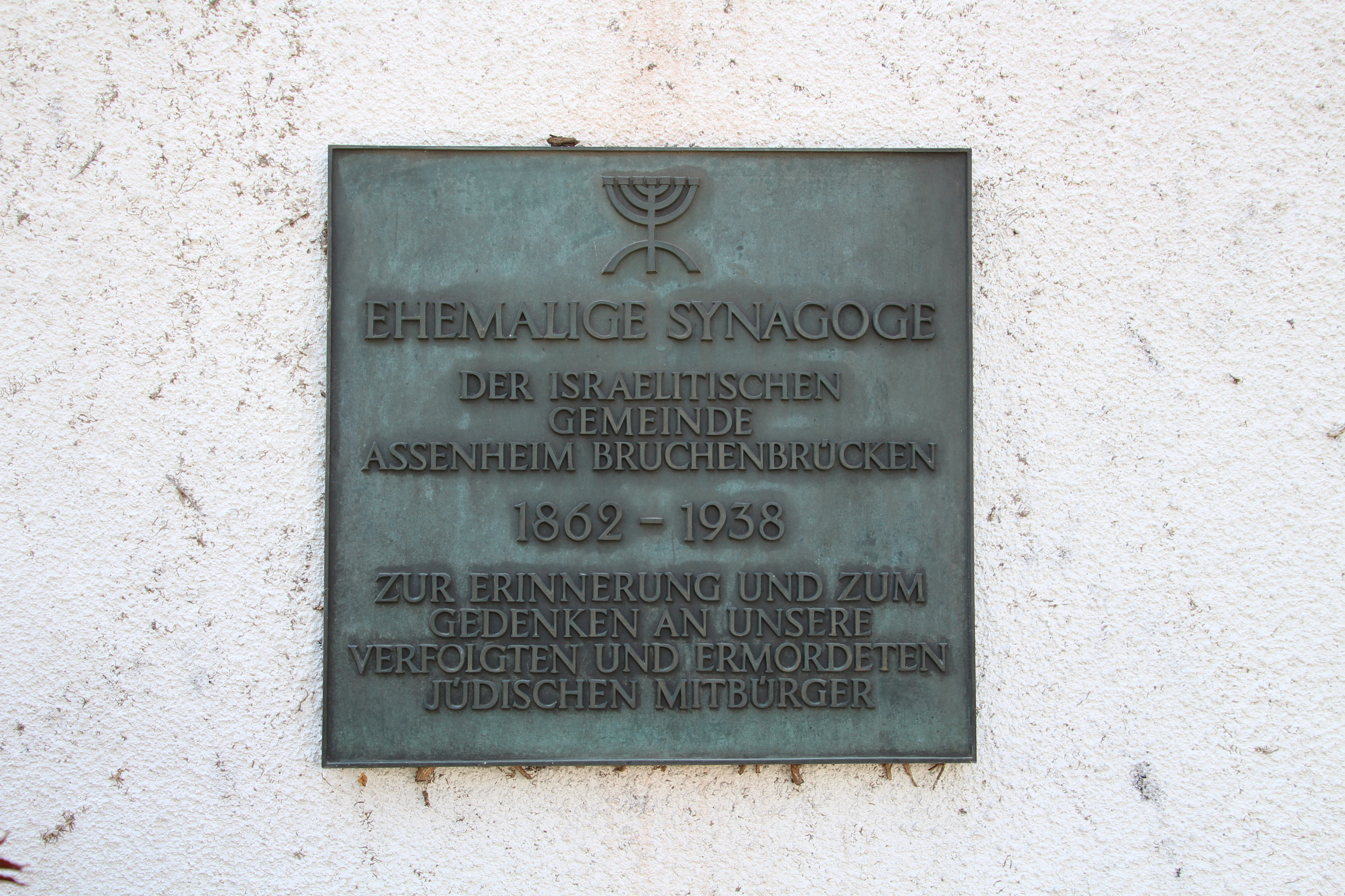 Assenheim - ehem. Synagoge